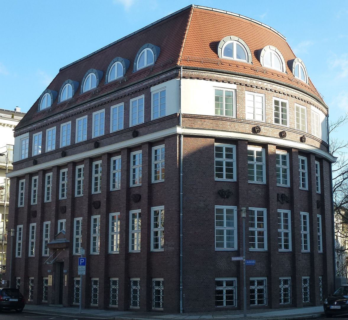 Krankenhausgesellschaft Sachsen in Leipzig